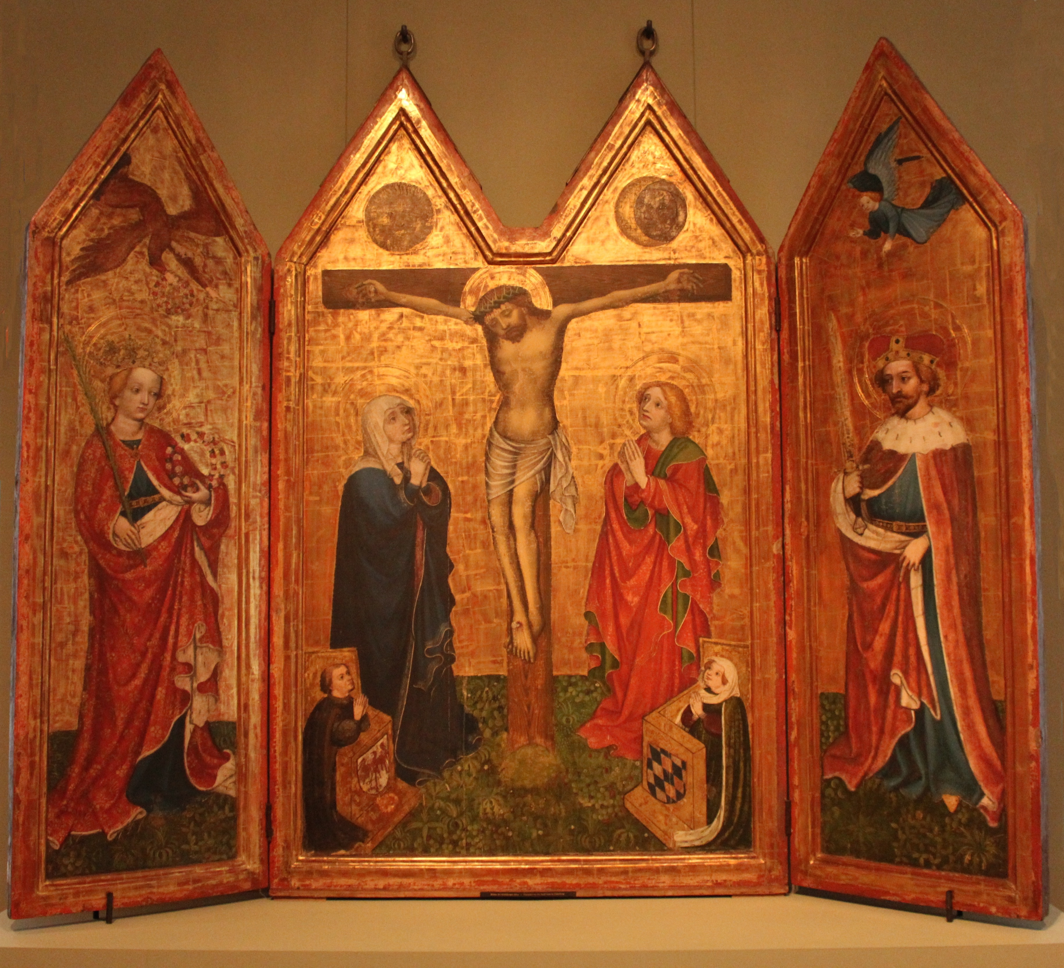 Das Dreiflügel-Retabel zeigt auf der Mitteltafel die Crucifixion with Saint Mary and Saint John Evangelist sowie die in Betstühlen knienden Stifter, auf den Flügeln innen die Heiligen Cäcilie und Valerian, auf den Außenseiten der Flügel die Verkündigung. Als zugehörig gelten zwei heute verschollene Standflügel mit den Heiligen Urban und Sigismund. Anhand der Entstehungszeit des Altars und der an den Betstühlen angebrachten Wappen von Zollern und Bayern sind die Stifter als Burggraf Friedrich VI. – als Kurfürst von Brandenburg Friedrich I. – und seine Gemahlin Elisabeth von Bayern-Landshut zu erkennen, zu deren Hauptresidenzen die Cadolzburg zählte. Der Flügelaltar muss nach 1417 entstanden sein, der rote Adler auf dem linken Betstuhl Friedrichs I, deuten auf die 1417 erfolgte Belehnung Friedrichs mit der Mark Brandenburg. 1426 zog sich Friedrich I. hierhin zurück, der altar muss nach 1426 entstanden sein. 1850 machte der preußische Jurist und Geschichtsforscher Julius von Minutoli das im Zuge seiner Forschungen über Friedrich I. wiederentdeckte Werk publik. Nach dessen Besichtigung 1873 und auf seinen dringenden Wunsch erhielt Kronprinz Friedrich (III.), diesen als Geschenk.